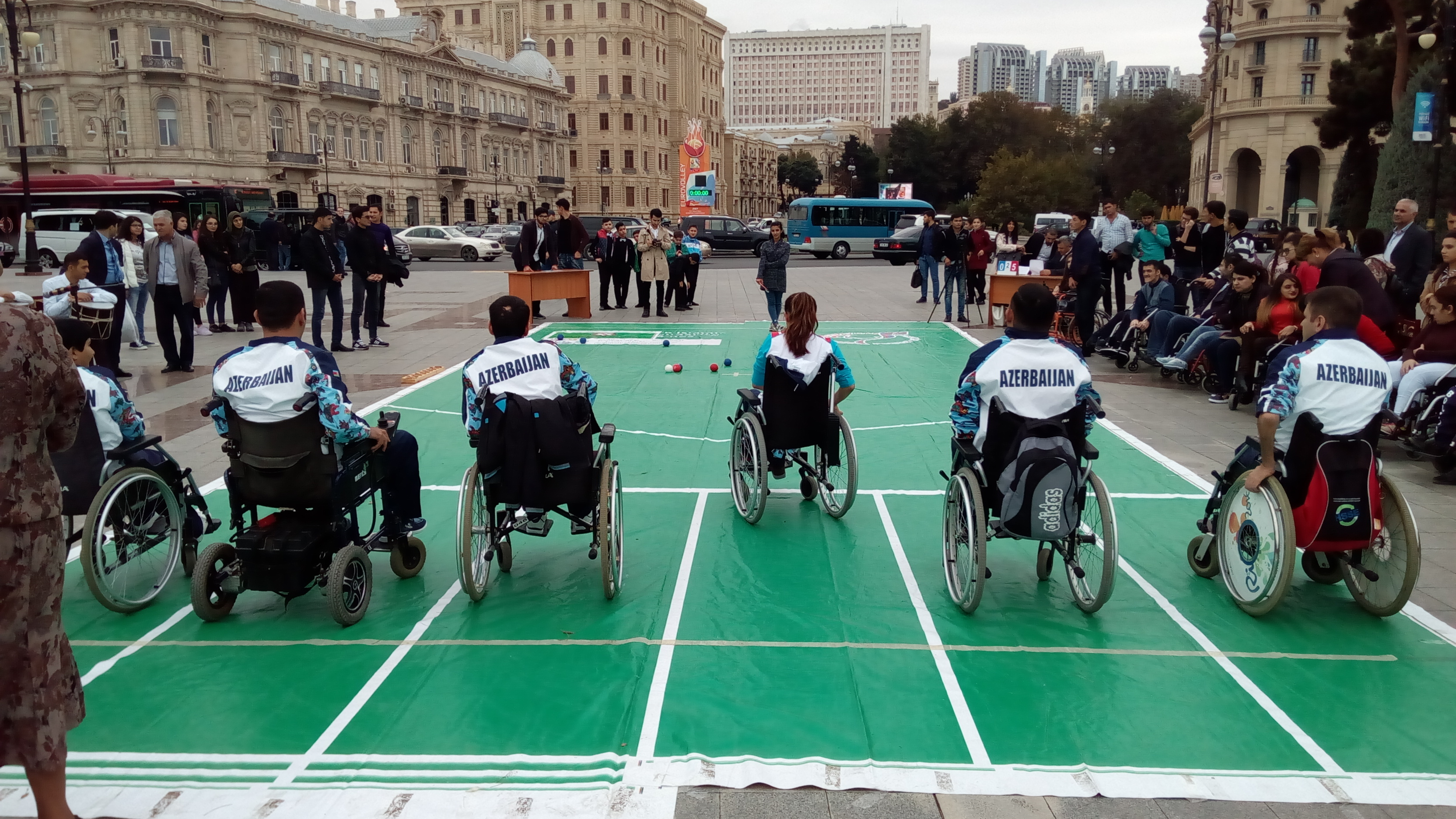 Azərbaycan Respublikası Prezidenti yanında Qeyri-Hökumət Təşkilatlarına Dövlət Dəstəyi Fondunun yardımı ilə “Arabaçı” Əlillər Şəbəkəsi İctimai Birliyinin təşkil etdiyi tədbir: Əlil idmançılar Dənizkənarı Milli Parkda boççia yarışında Daha ətraflı